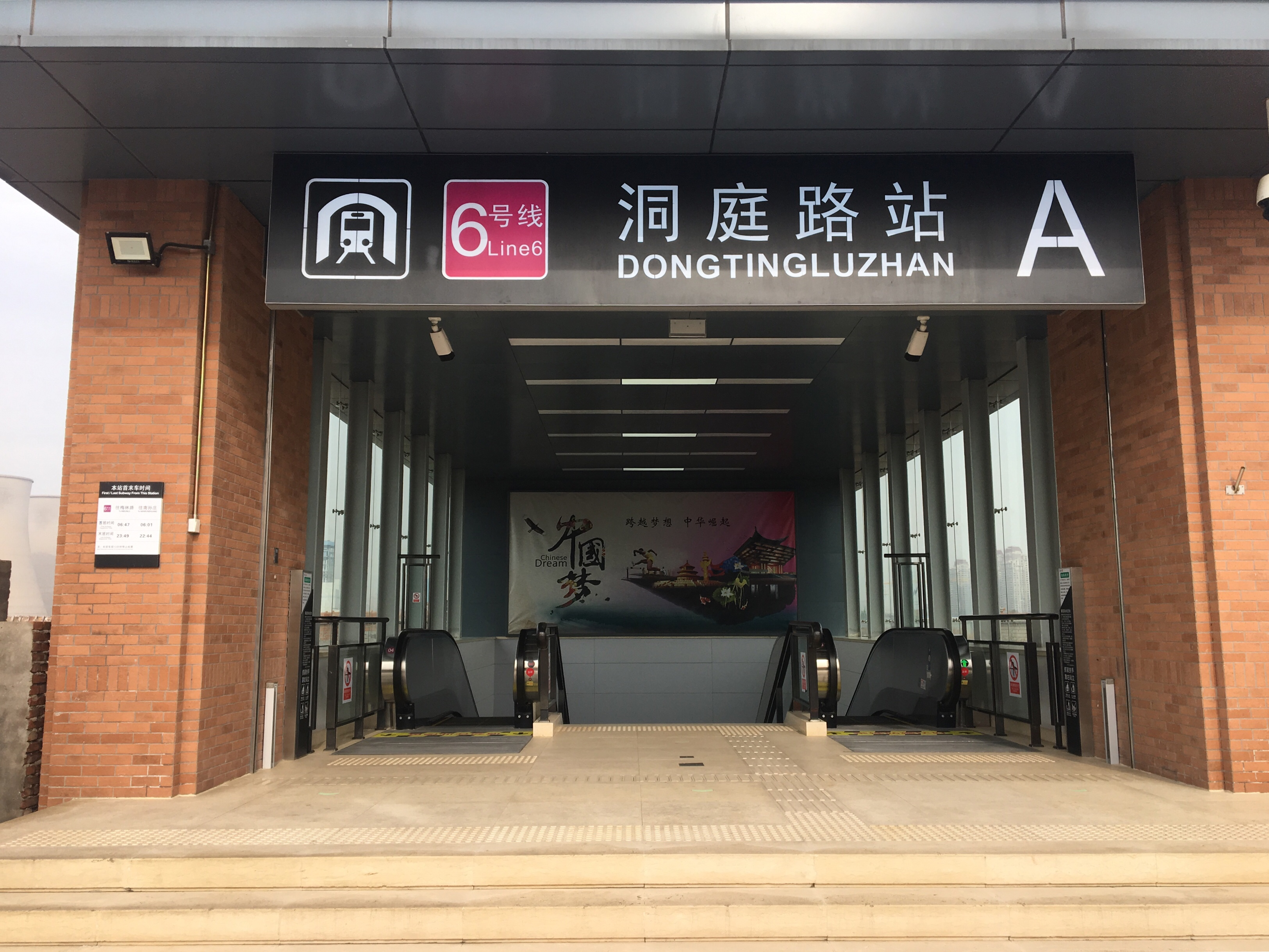 天津地铁洞庭路站A出入口